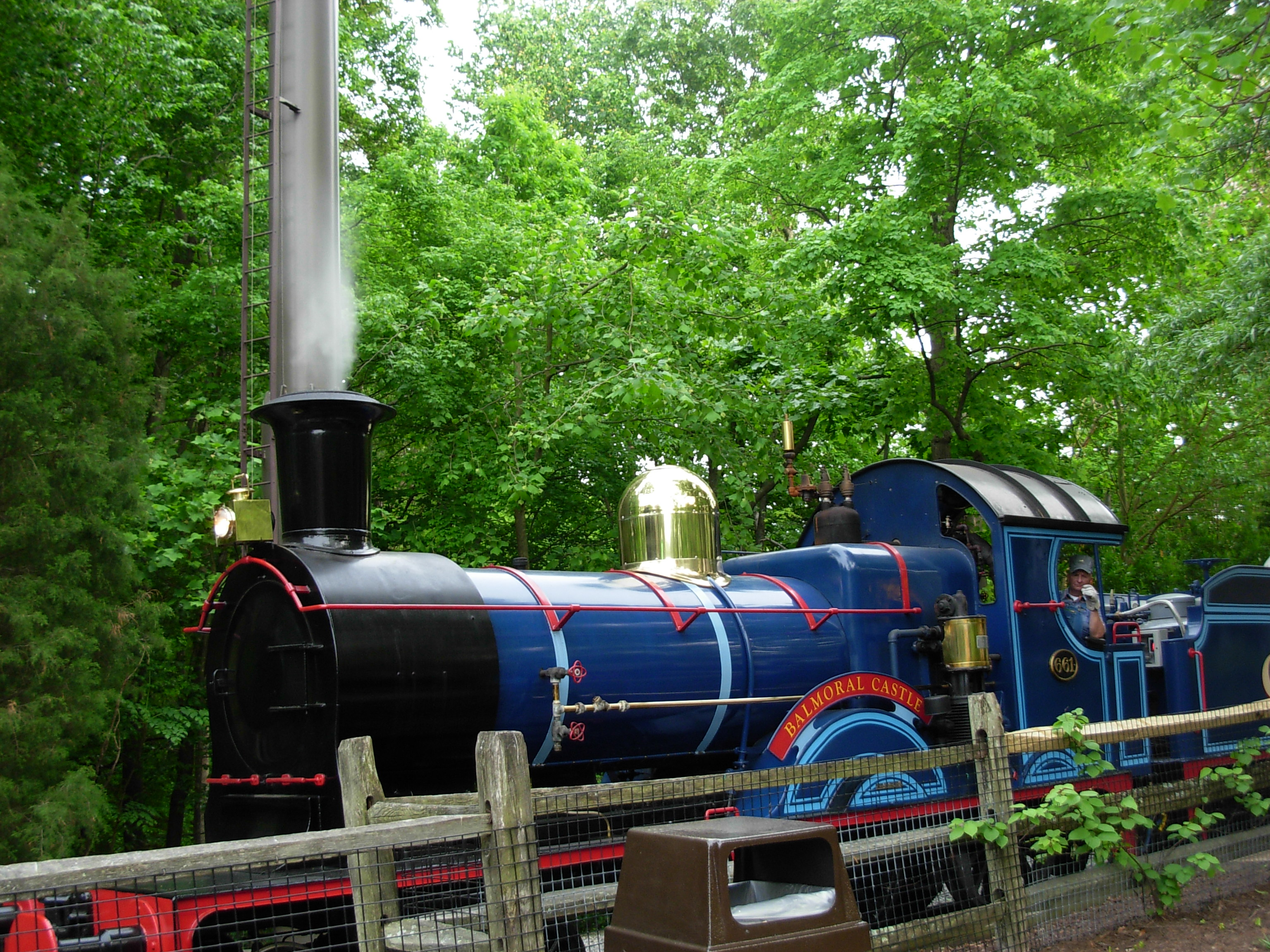 Busch Gardens Europe, Williamsburg Roller coasters Amusement rides